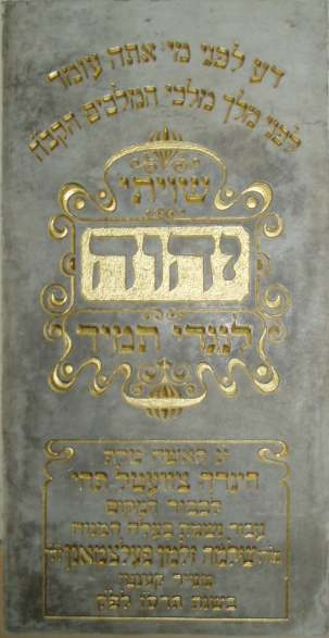 Chewra Lomdei Misznajot Synagogue in Oświęcim